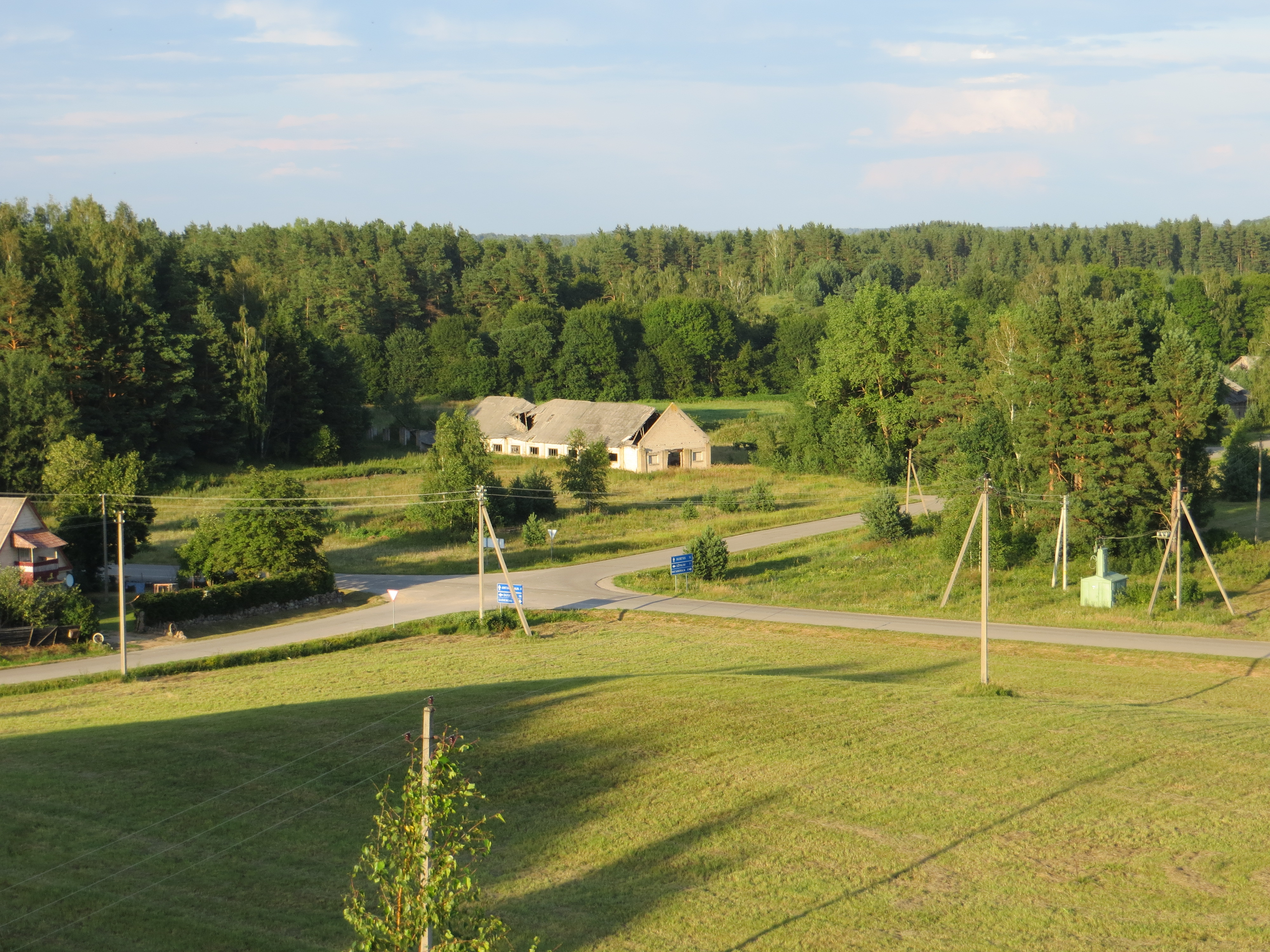 Sudeikių sen., Lithuania